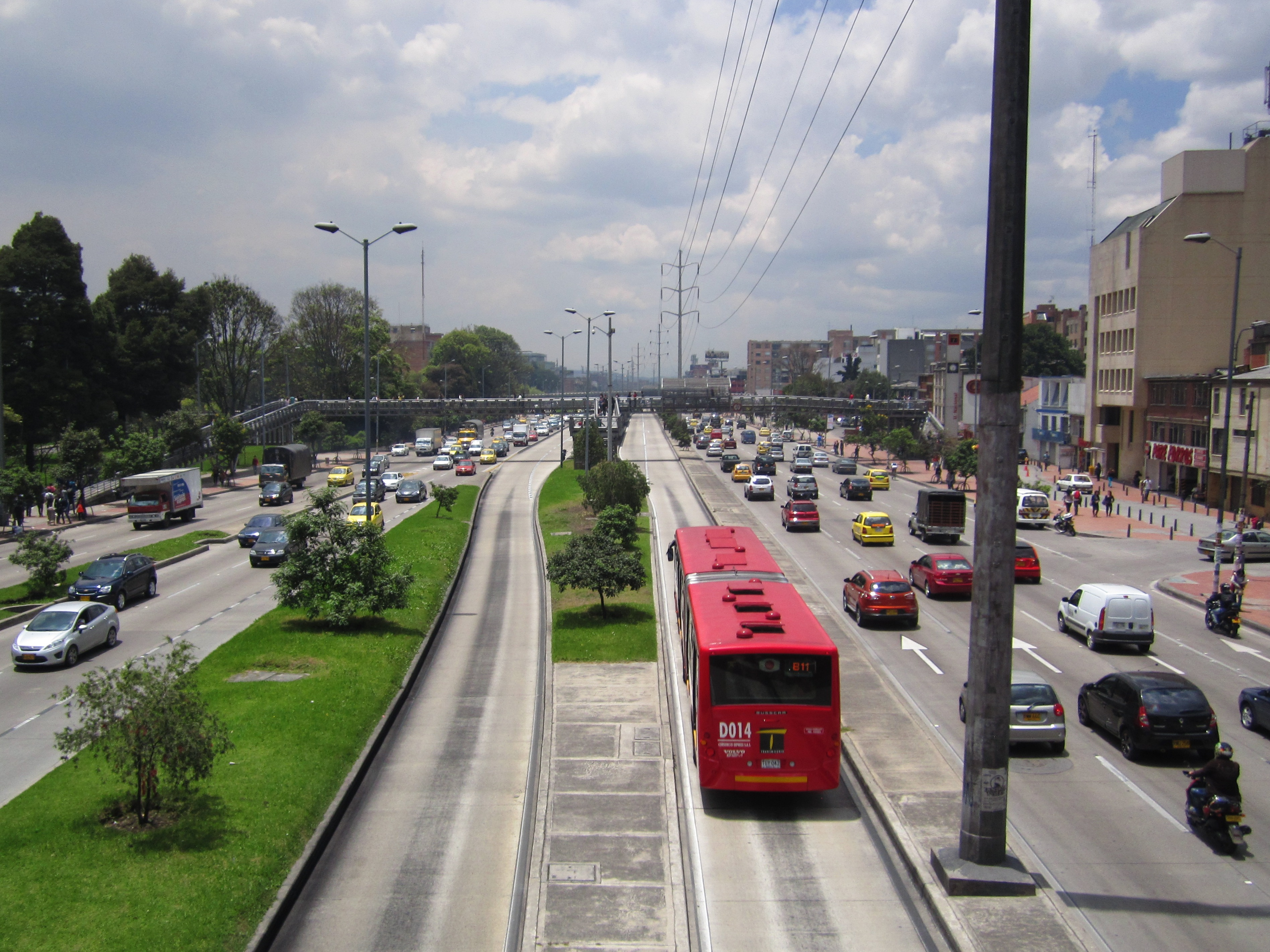 Avenida NQS Bogotá a la altura de la Universidad Nacional.